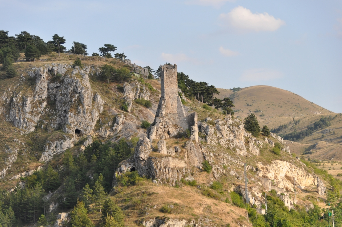 Pescina 2012